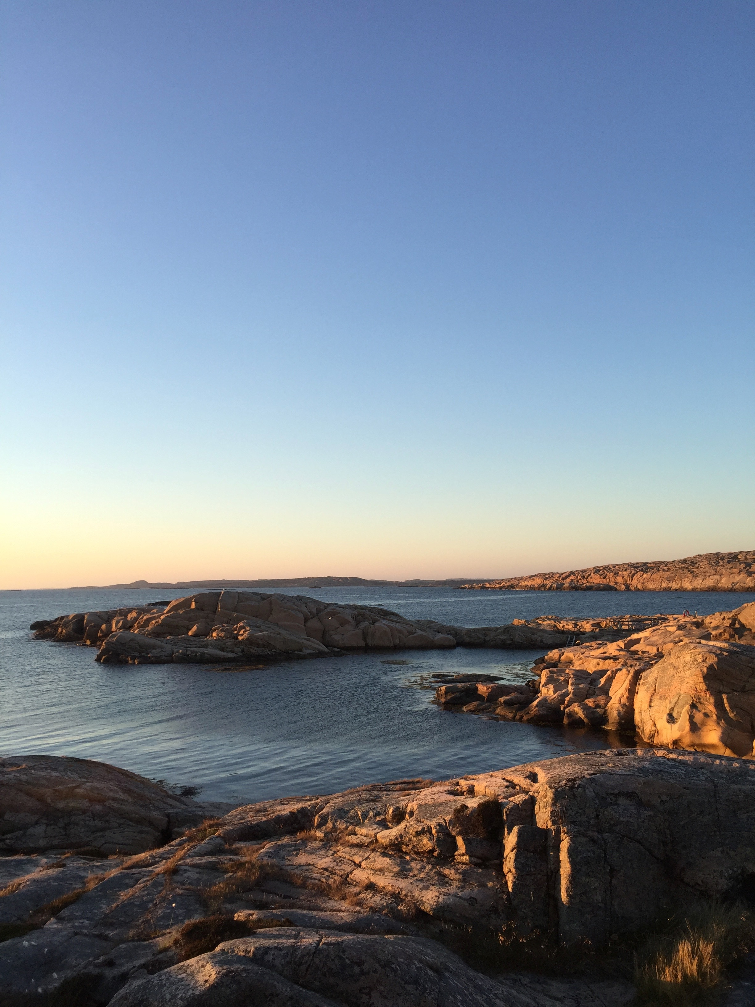 En los acantilados de Smögen